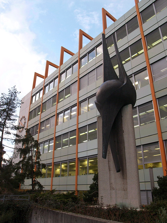 Hauptgebäude der ETA in Grenchen